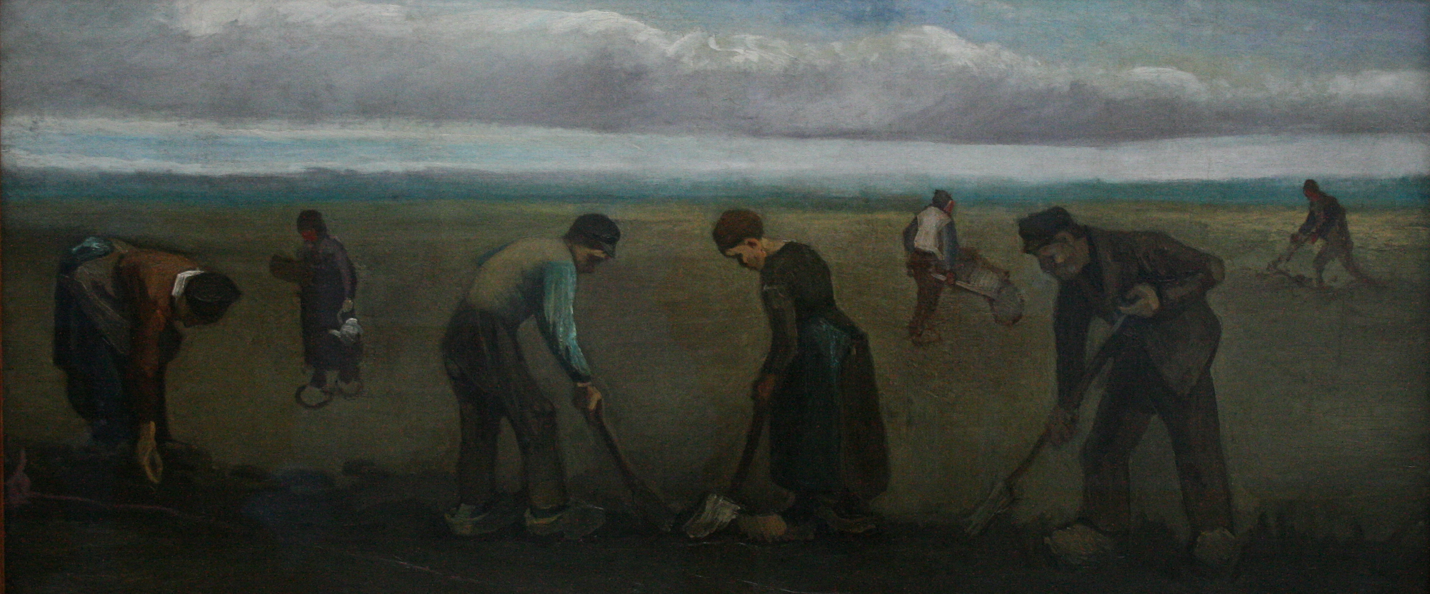 Peasants planting potatoes